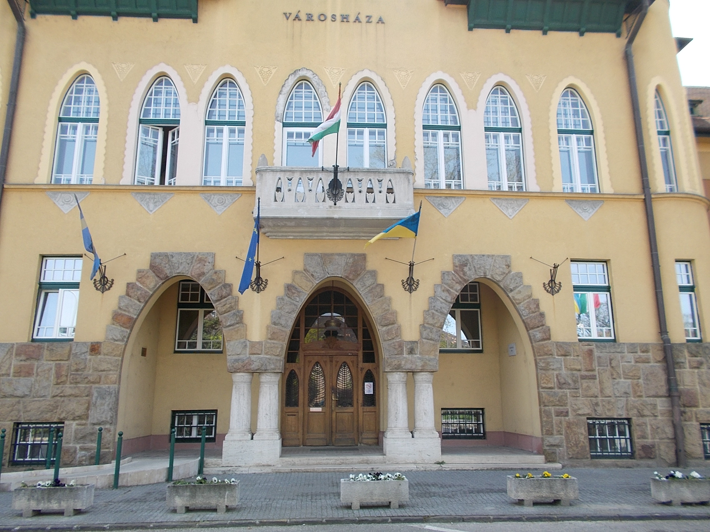 A Városháza műemlék épülete. Középső rész. - Budapest, 22. kerület. Bathó Lajos, helybéli építész és festő tervei alapján, helyi építőmester, Reiber Lőrinc kivitelezésében. - Budafok. Városház tér